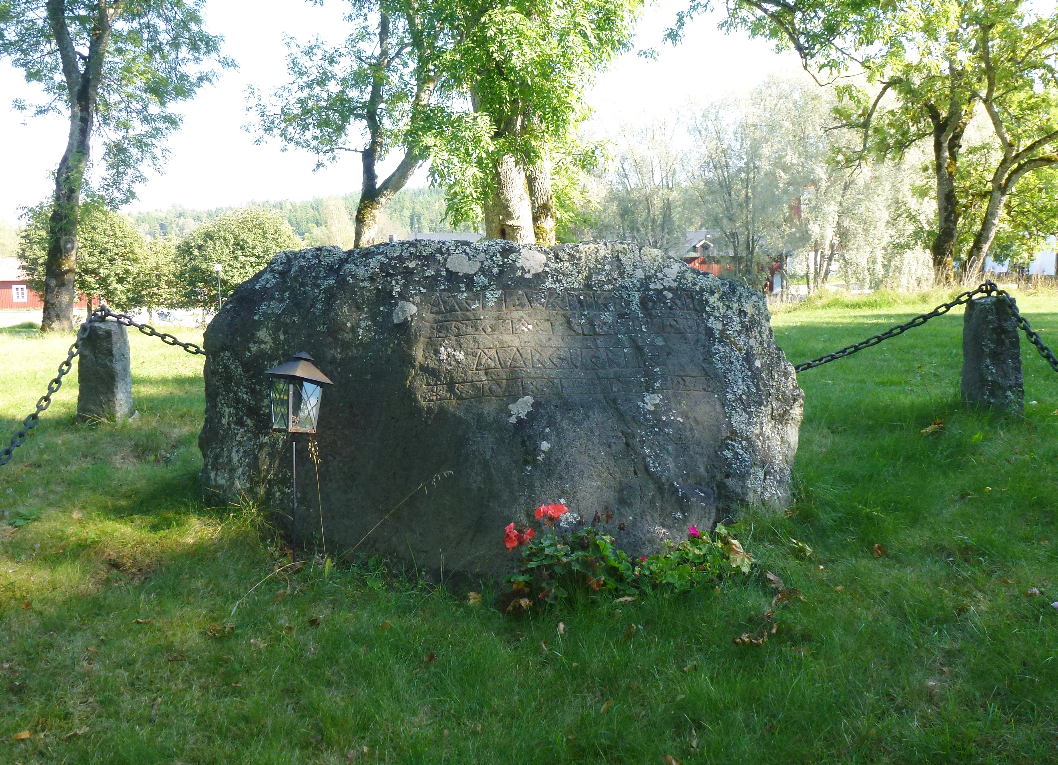 Häringe slott parken, Axel Wenner-Gren och hans hustru Marguerite Wenner-Gren, gravsten